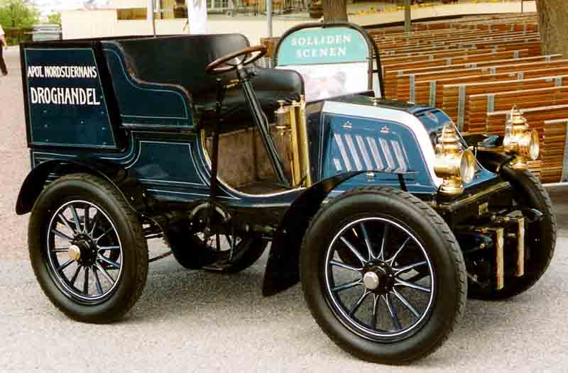 Scania Type A Tonneau 1903